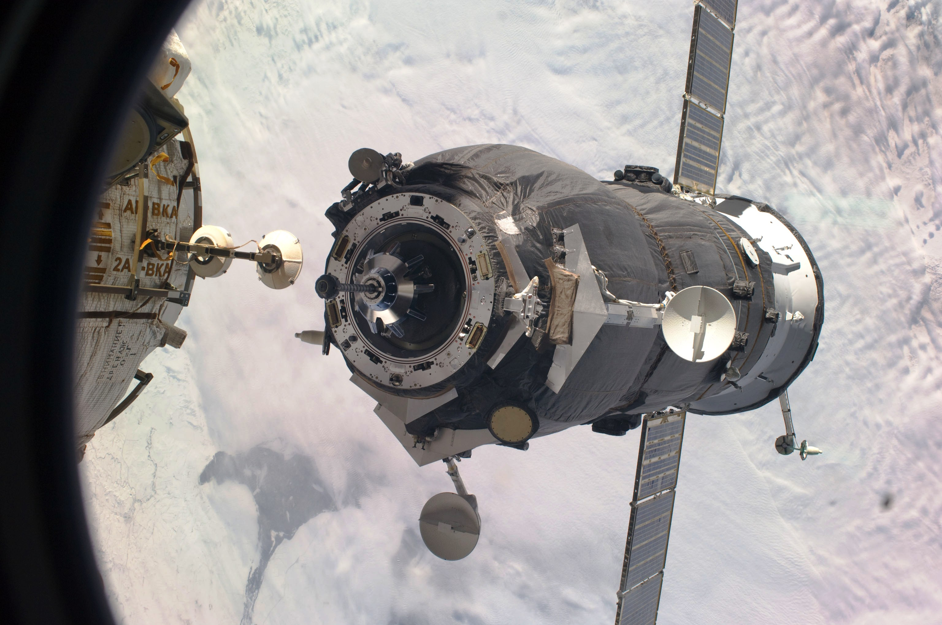 Progress М-66 dokujący do ISS